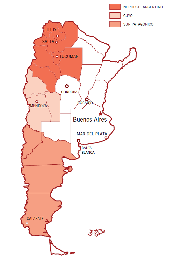 Mapa de delegaciones de la Cámara Española de Comercio de la República Argentina